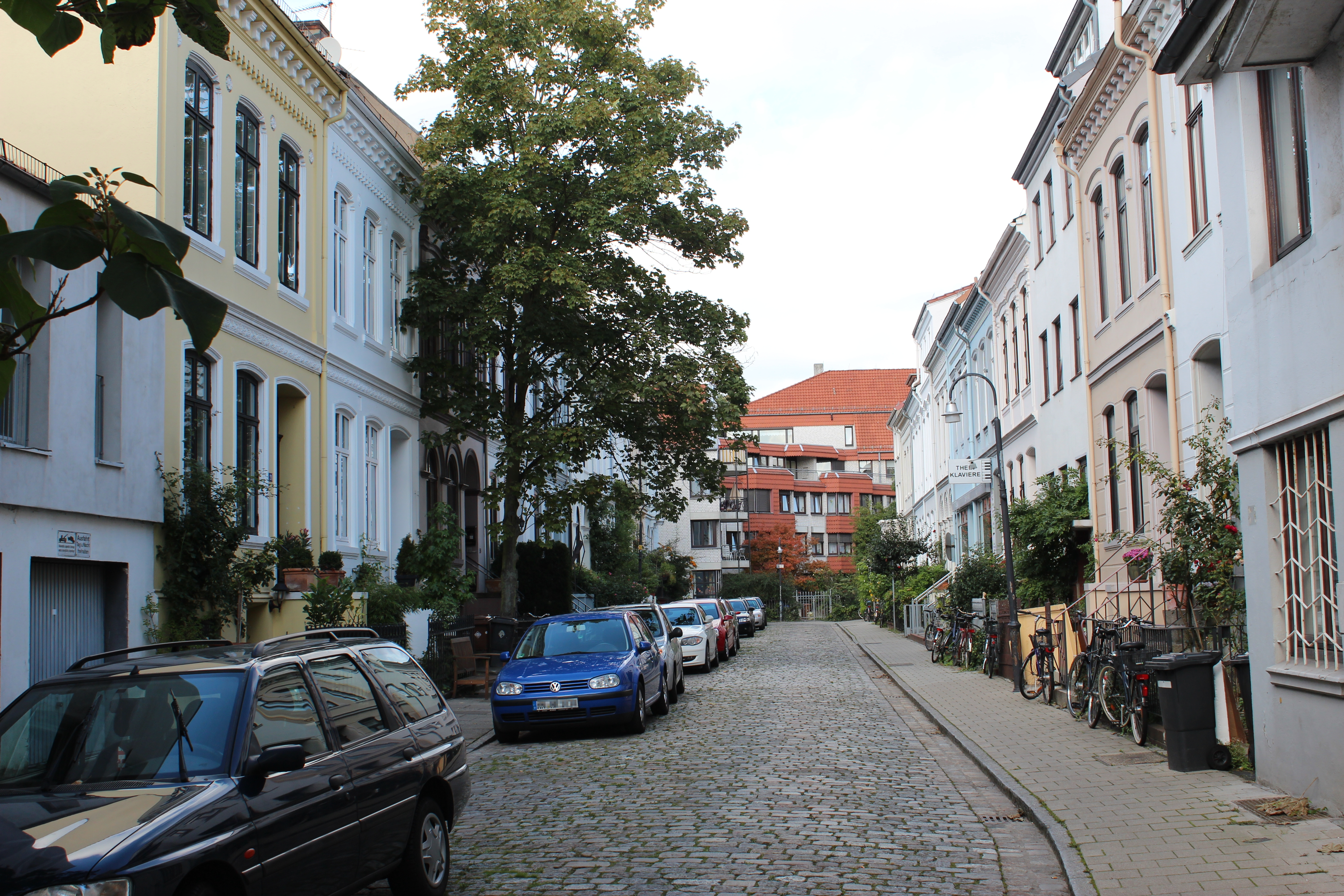 Ensemble Adlerstraße in Bremen, AdlerstraßeDie Denkmalgruppe ist ein geschütztes Kulturdenkmal in der Freien Hansestadt Bremen, mit der Nr. 0098 beim Landesamt für Denkmalpflege registriert.